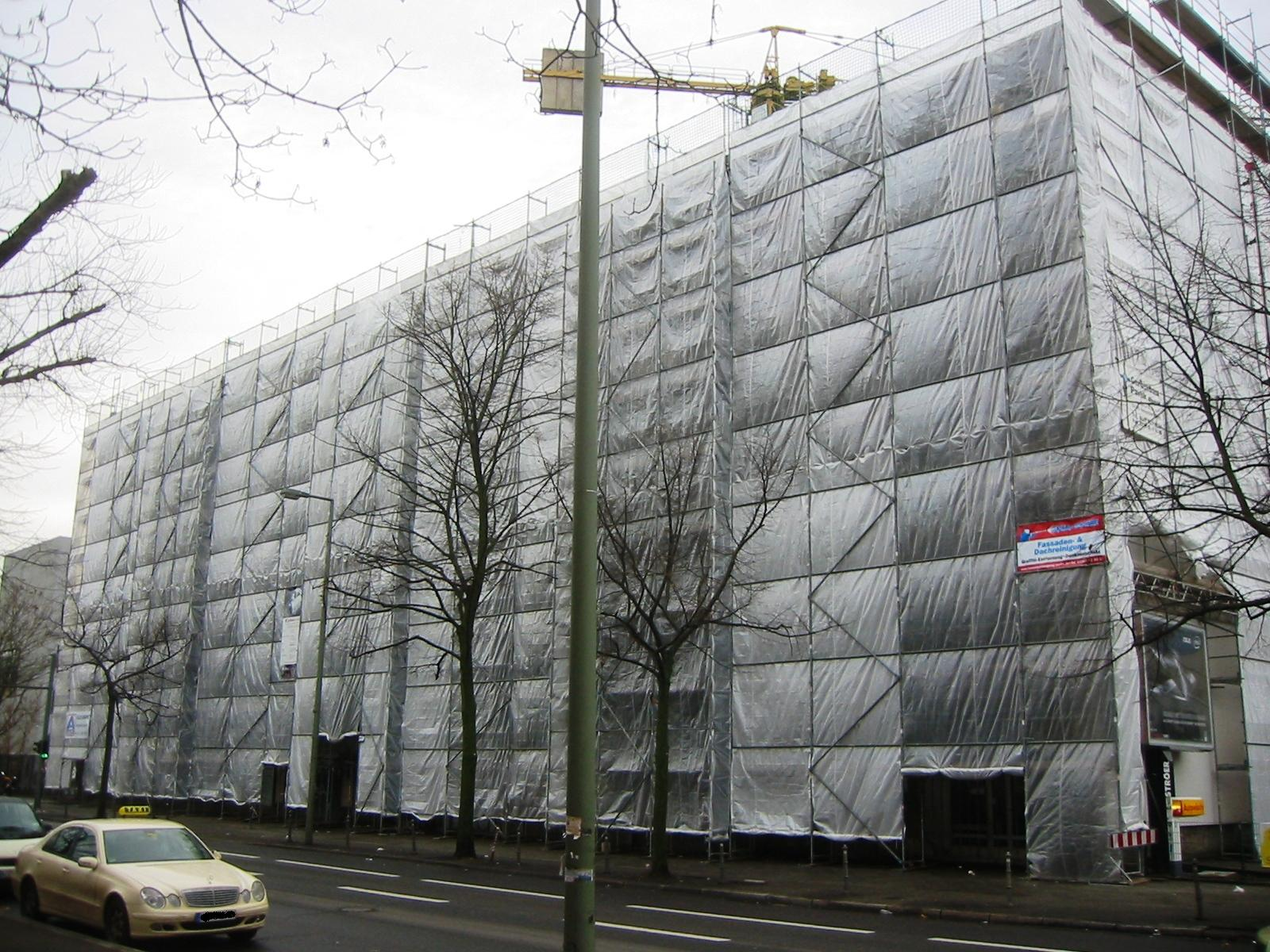 Das denkmalgeschützte Elsnerhaus in der Oranienstraße in Berlin-Kreuzberg zum Zeitpunkt des Umbaus im Jahr 2012.